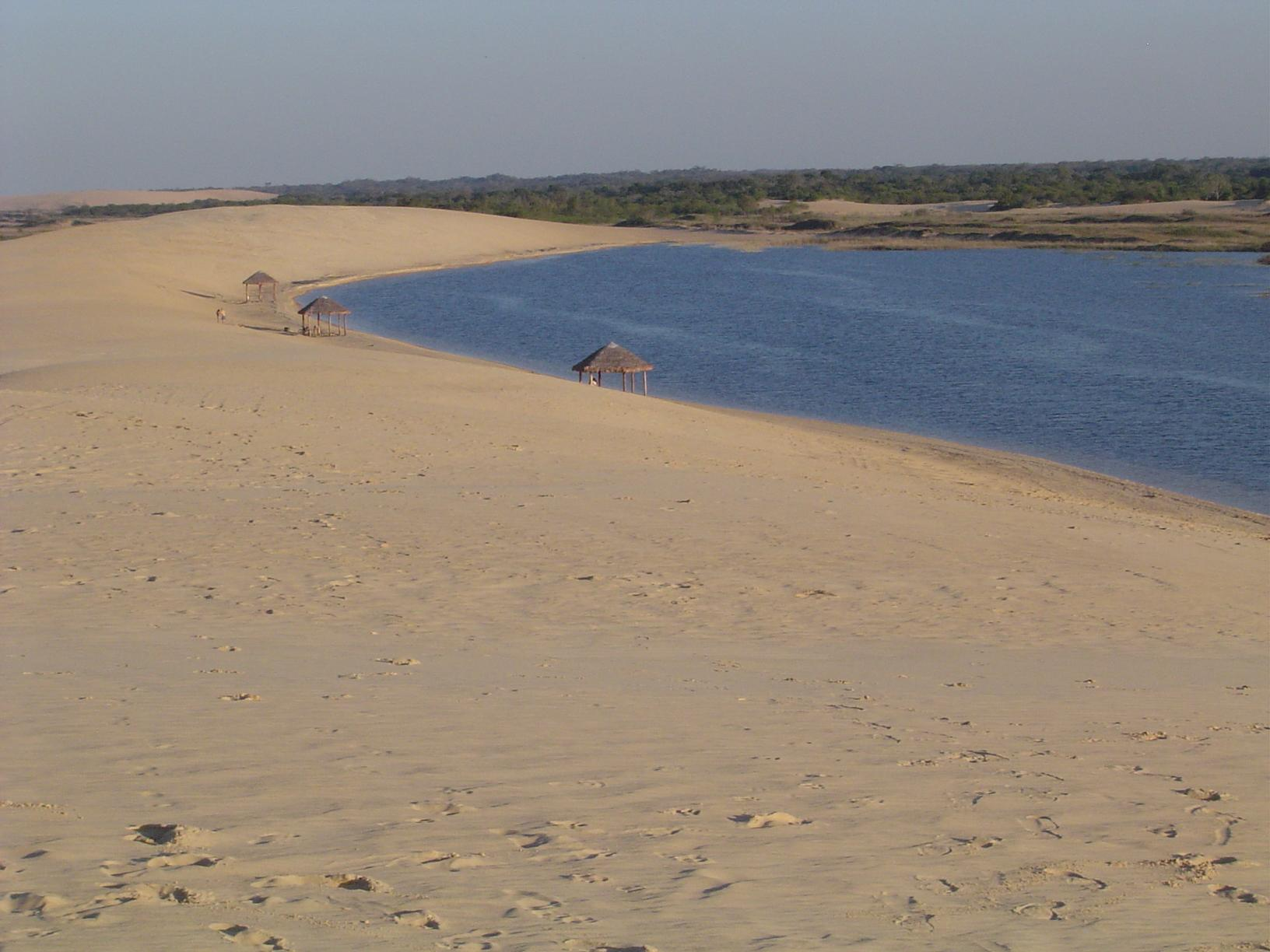 Lomas de Arena